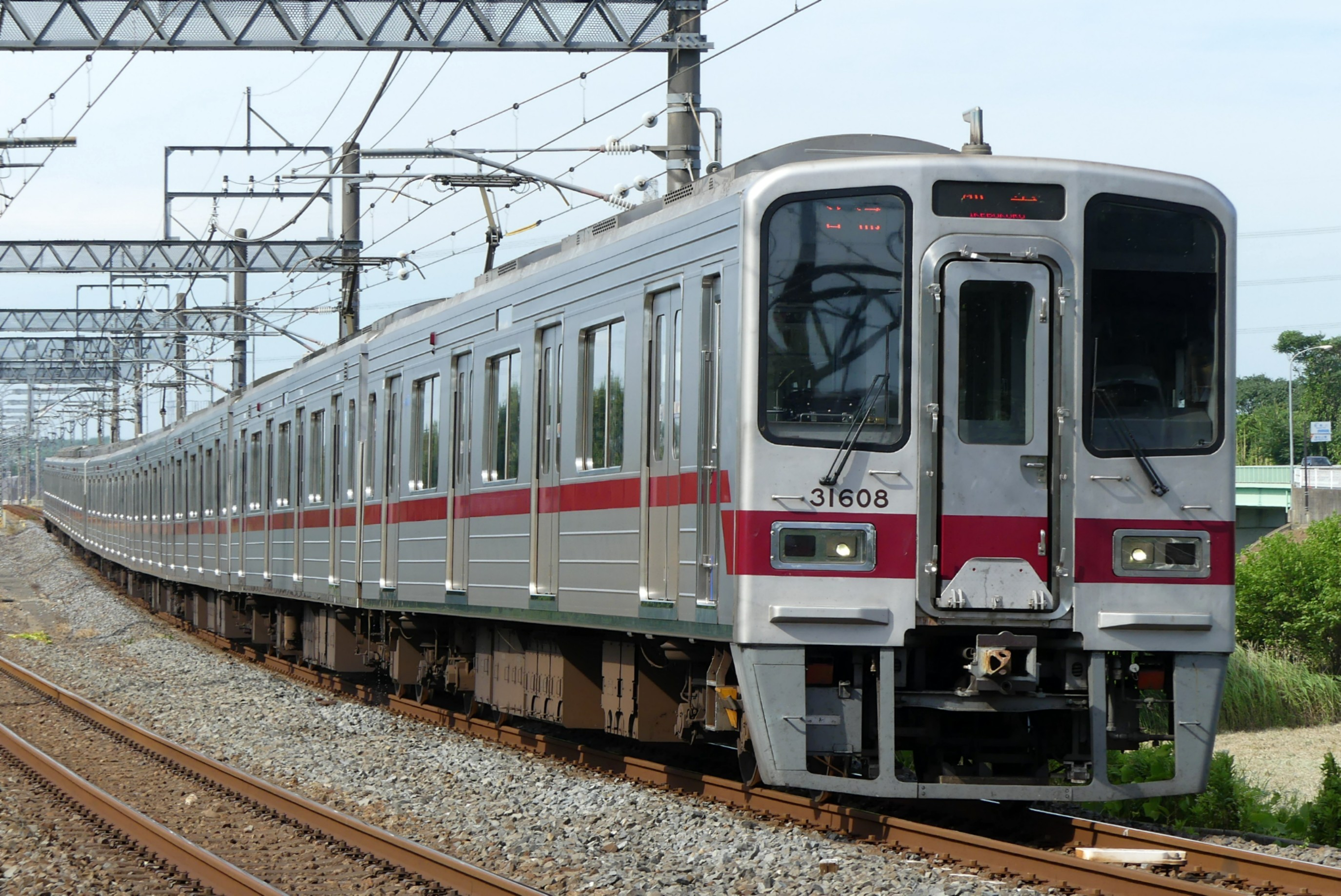 東武鉄道東上線30000系電車